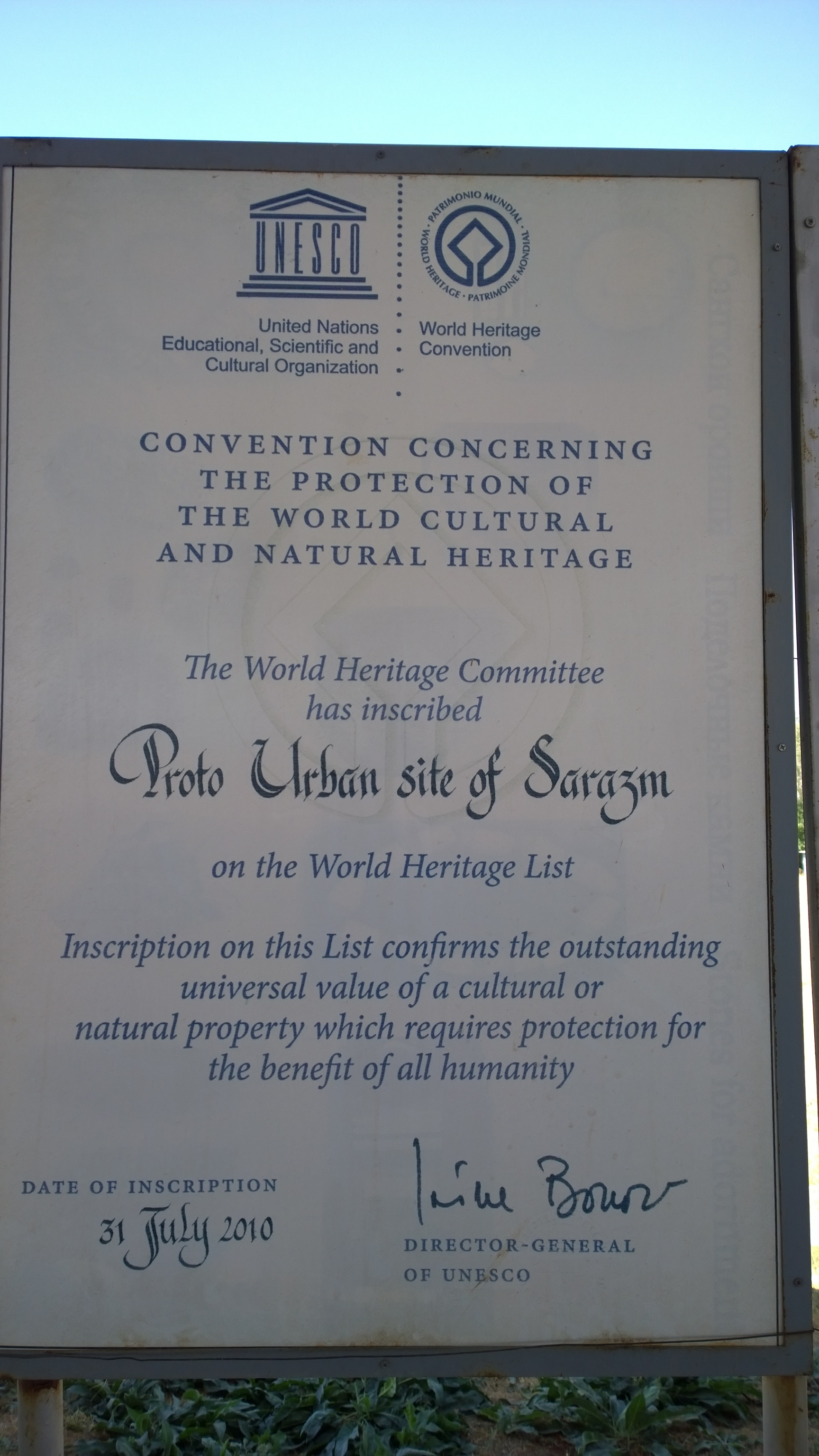 Тоҷикӣ: Саразм, Юнеско